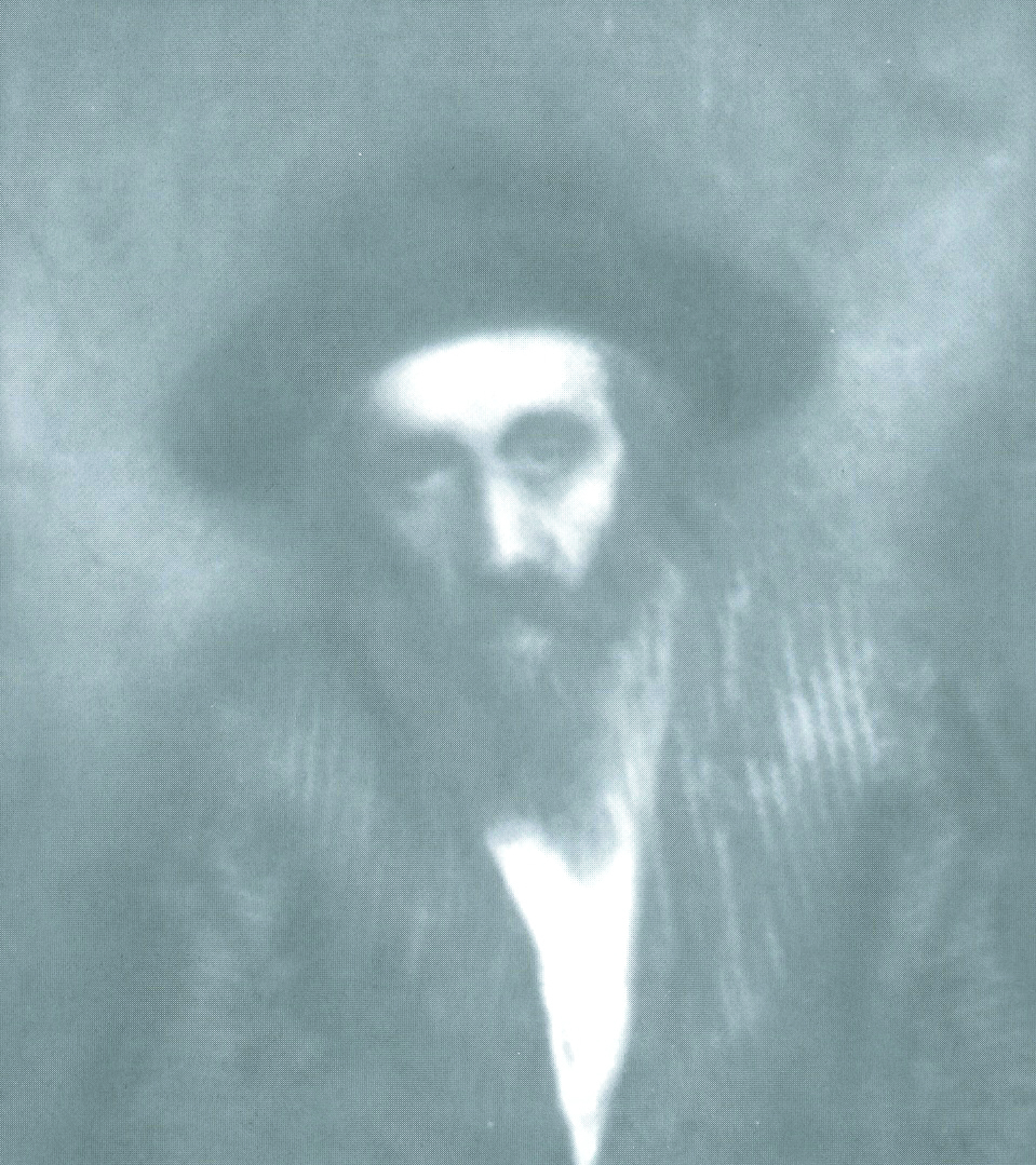 תמונת האדמו"ר רבי אהרן ראטא בעל "שומר אמונים"